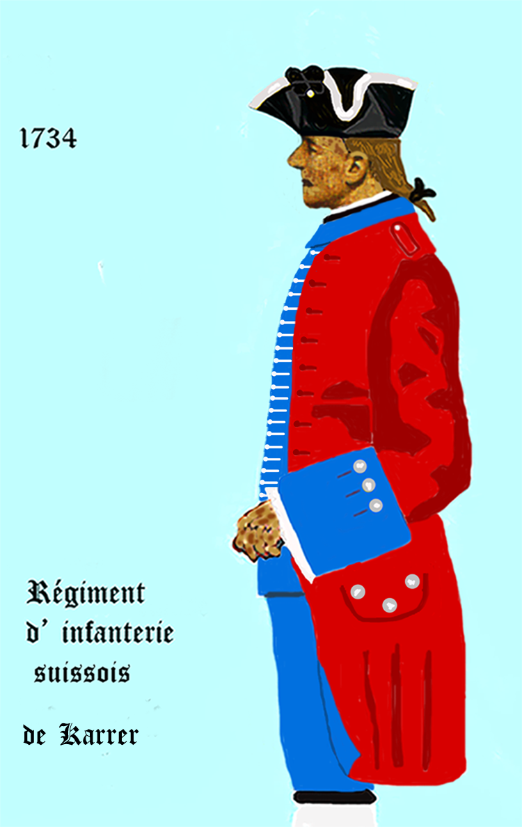 Uniform eines königlich französischen Infanterie-Regiments gemäß Dekret von 1734. - Entnommen und überarbeitet aus: „LES UNIFORMES ET LES DRAPEAUX DE L'ARMÉE DU ROI“ Marseille 1899.